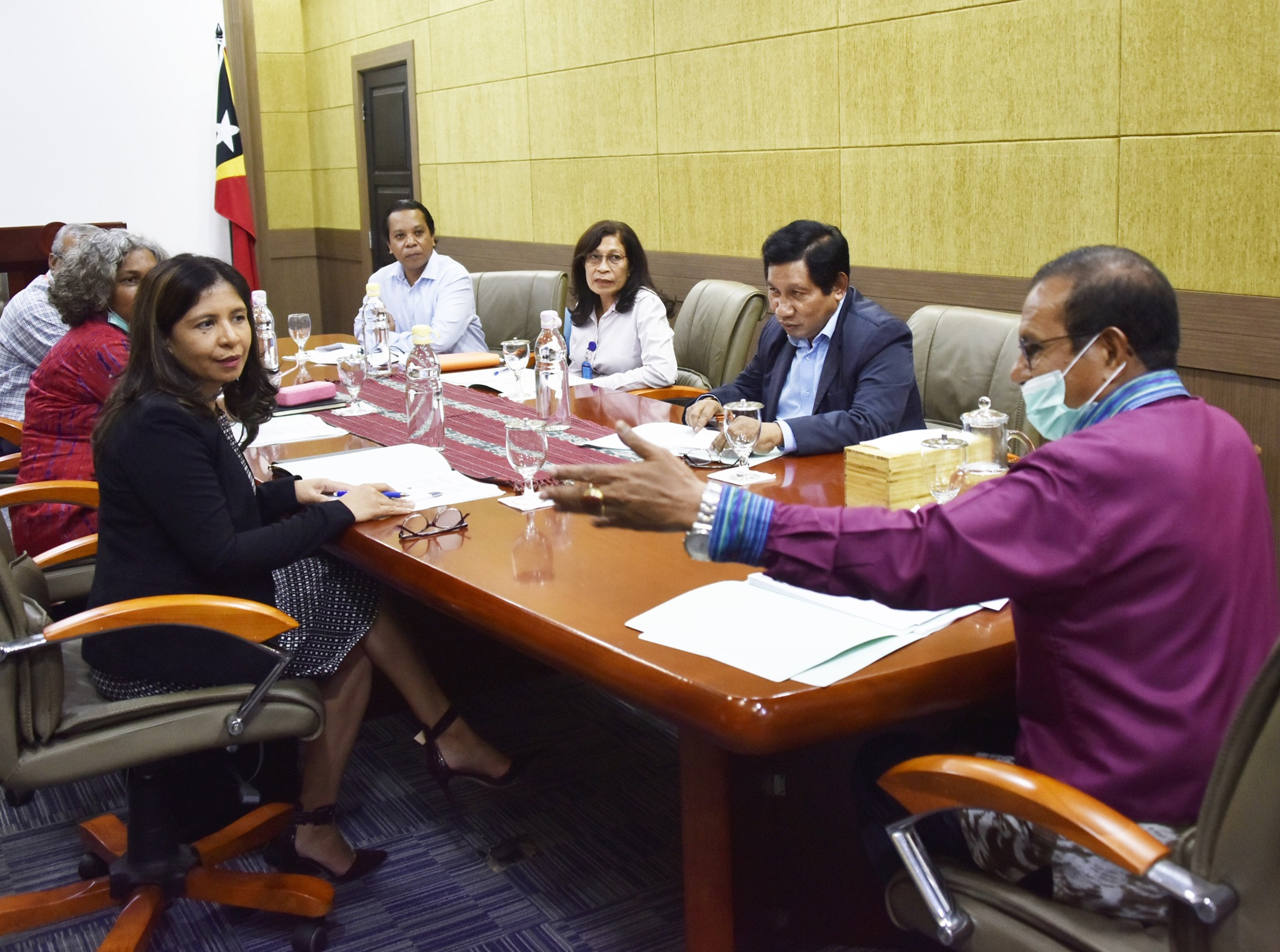 Kommission zur Beratung und Bewertung von Strategien zur Präbention und Bekämpfung der Coronavirus-PandemieTetun: Komisaun Akompañamentu no Avaliasaun Estratéjia ba Prevensaun no Kombate Pandemia Koronavírus